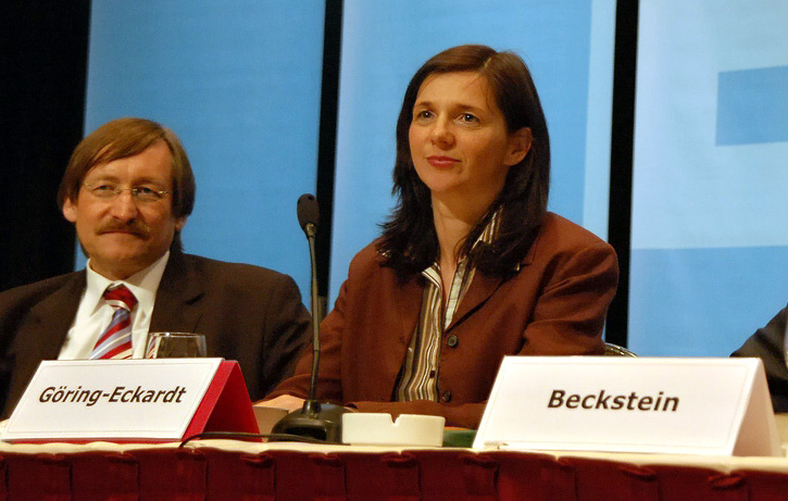 Beispiel für Tischnamensschilder für die Versammlungsleitung bei einer Veranstaltung: Namensschildhalter mit aufgelegten Namensschildern mit größerer Schrift. (Hier bei der EKD-Synode am 2. Mai 2009 in Würzburg; Präses Katrin Göring-Eckardt und die stellvertredenden Präsides Günther Beckstein (rechts, nicht im Bild) und Klaus Eberl (links).)